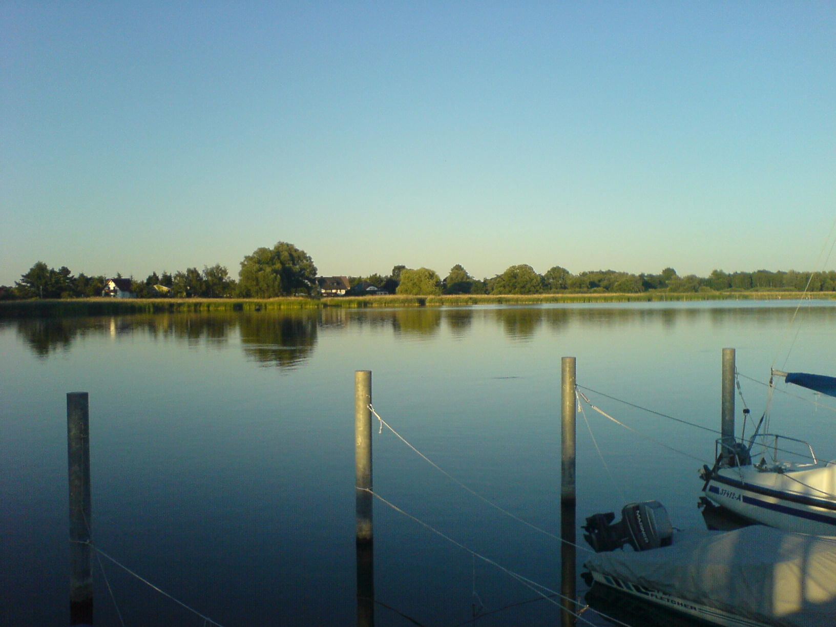 Der Beetzsee an der Bootsanlegestelle in der Gemeinde Beetzsee OT Radewege